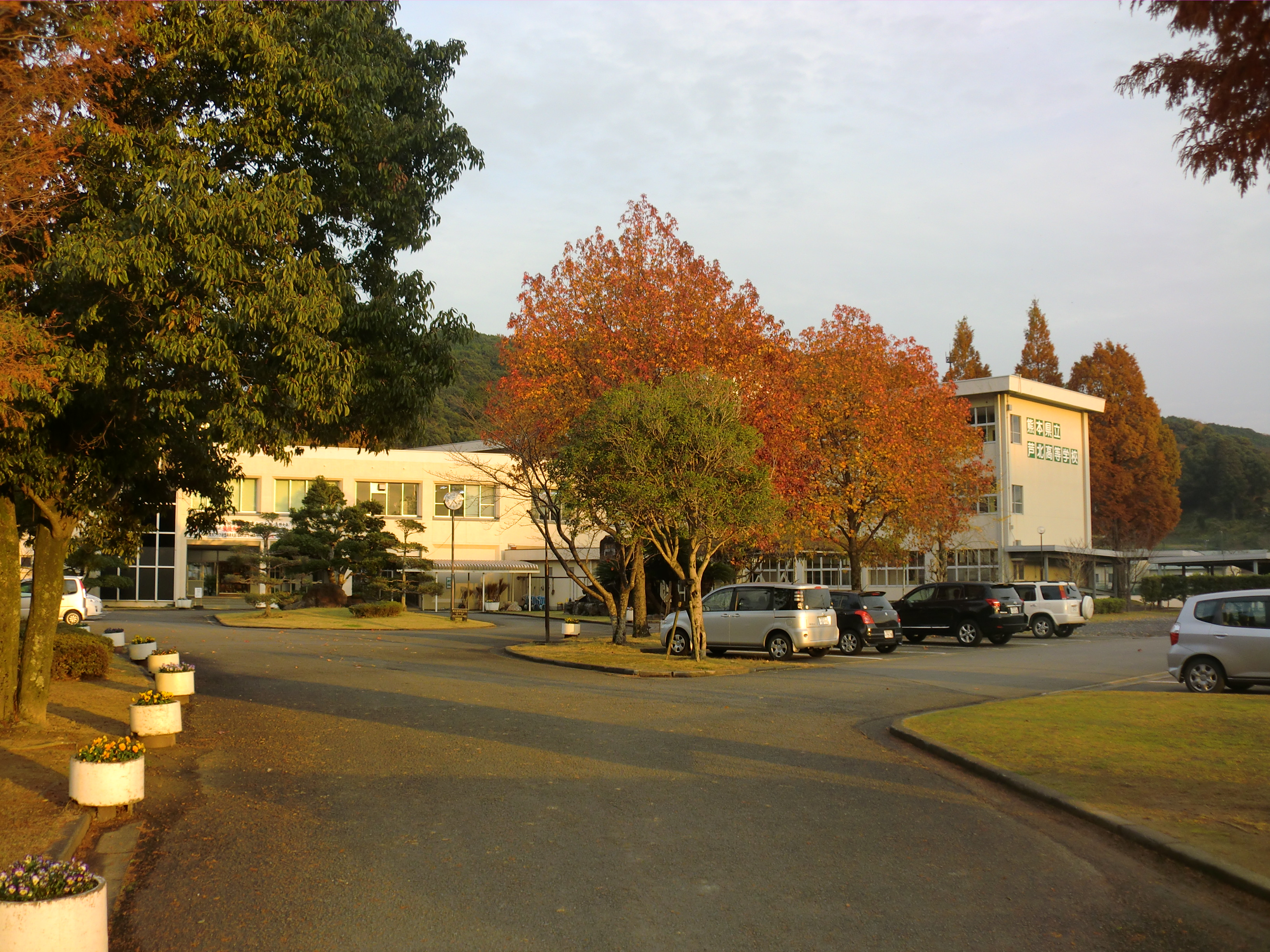 熊本県葦北郡芦北町にある芦北高等学校